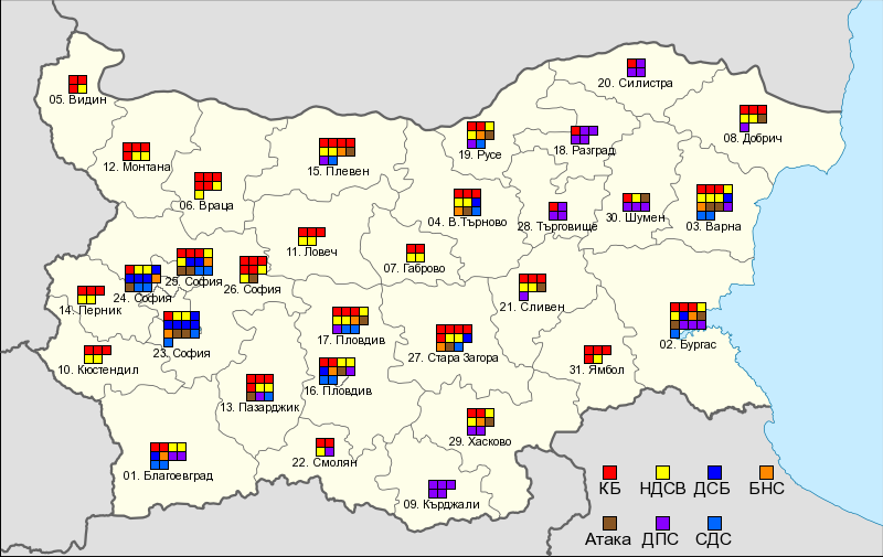 Парламентарни избори в България през 2005: депутатски места по район